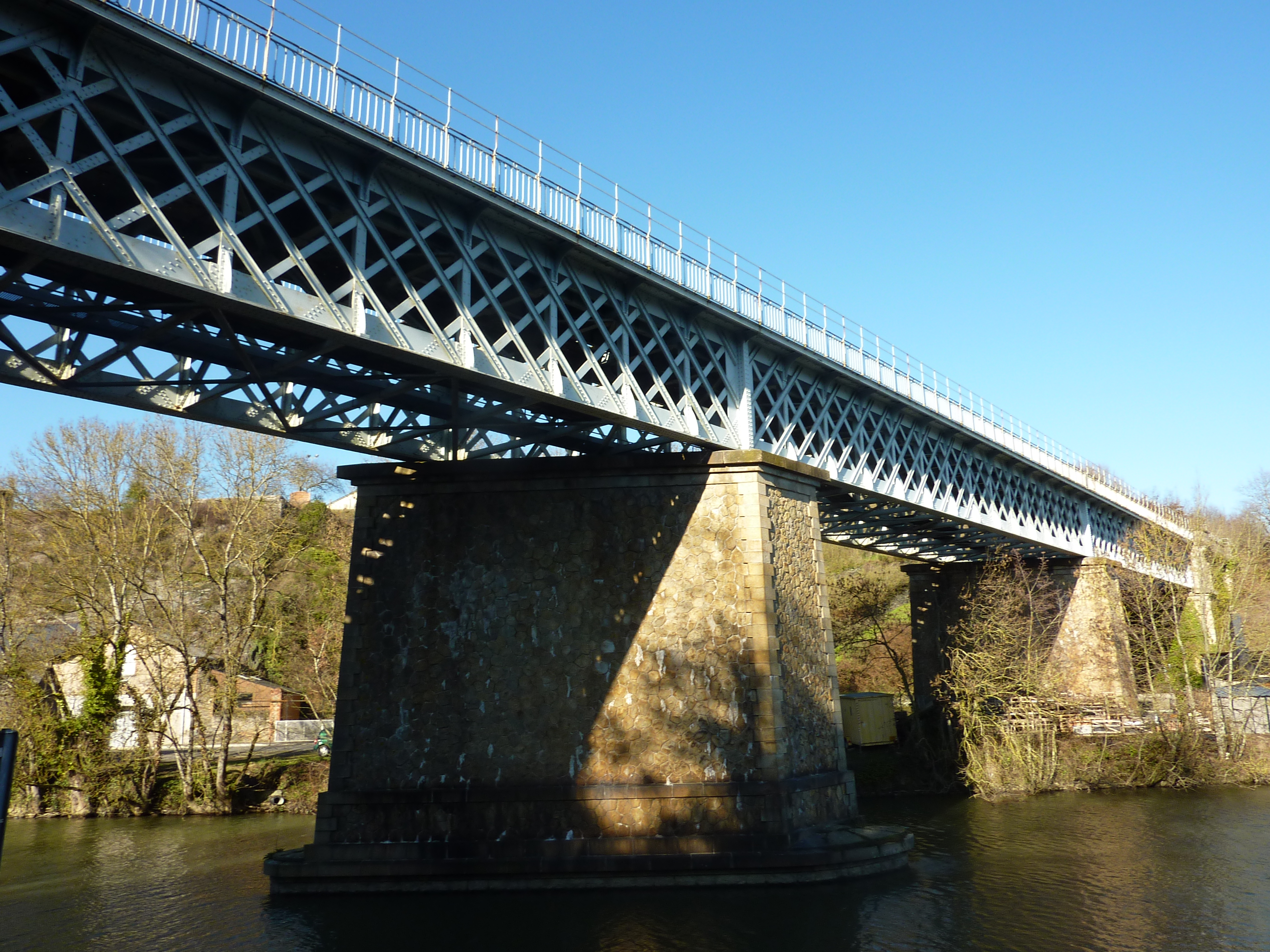 Vue d'ensemble